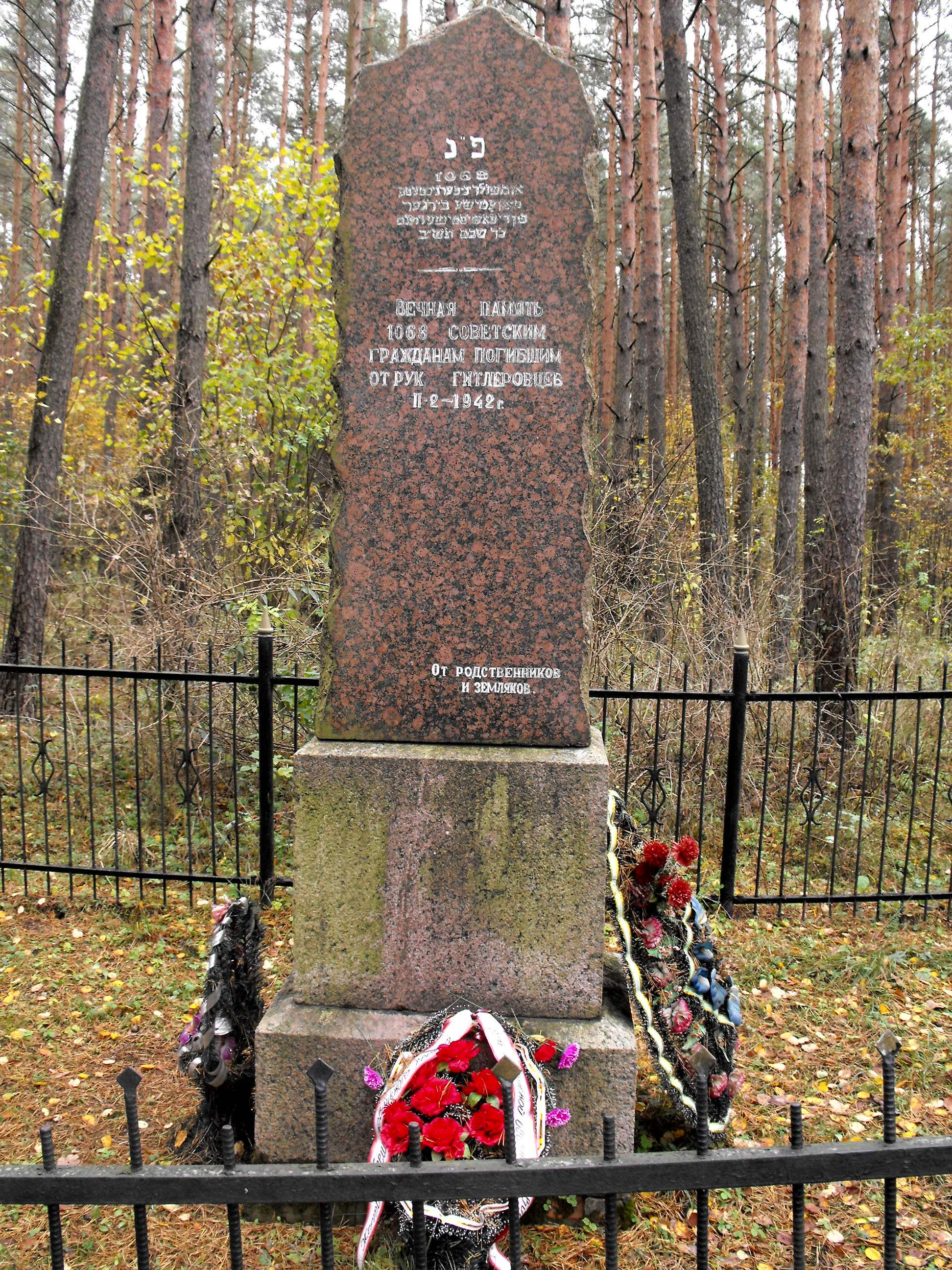 Памятник убитым евреям из Бешенковического гетто на правом берегу Западной Двины (ранее - посёлок Стрелка). Государственное воинское захоронение (Ковляковский сельсовет Шумилинского района) – номер знака 6391